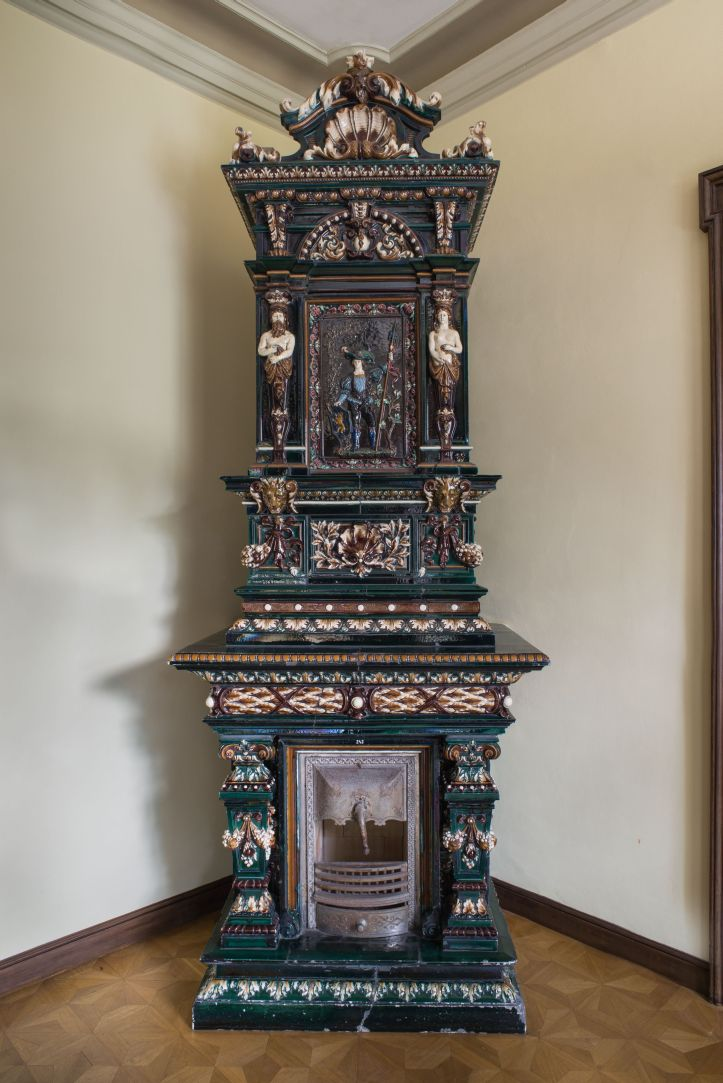 Jeden z exponátů kachlových kamen vyrobených v kopřivnické továrně na výrobu hliněného zboží ke konci 19. století. Fotografie z expozice Lašského muzea.